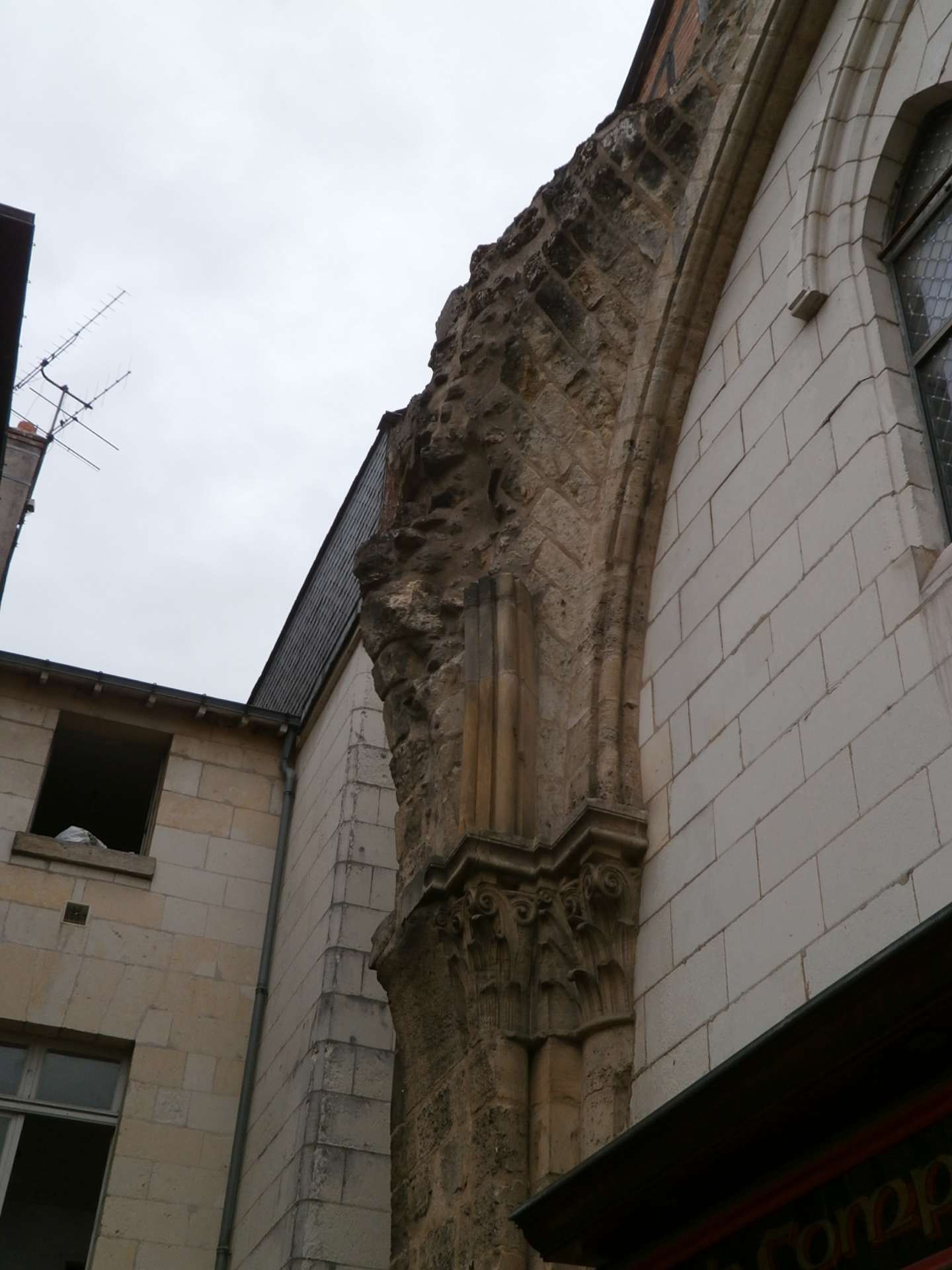 église Saint-Pierre le Puellier (Tours) féce est détail